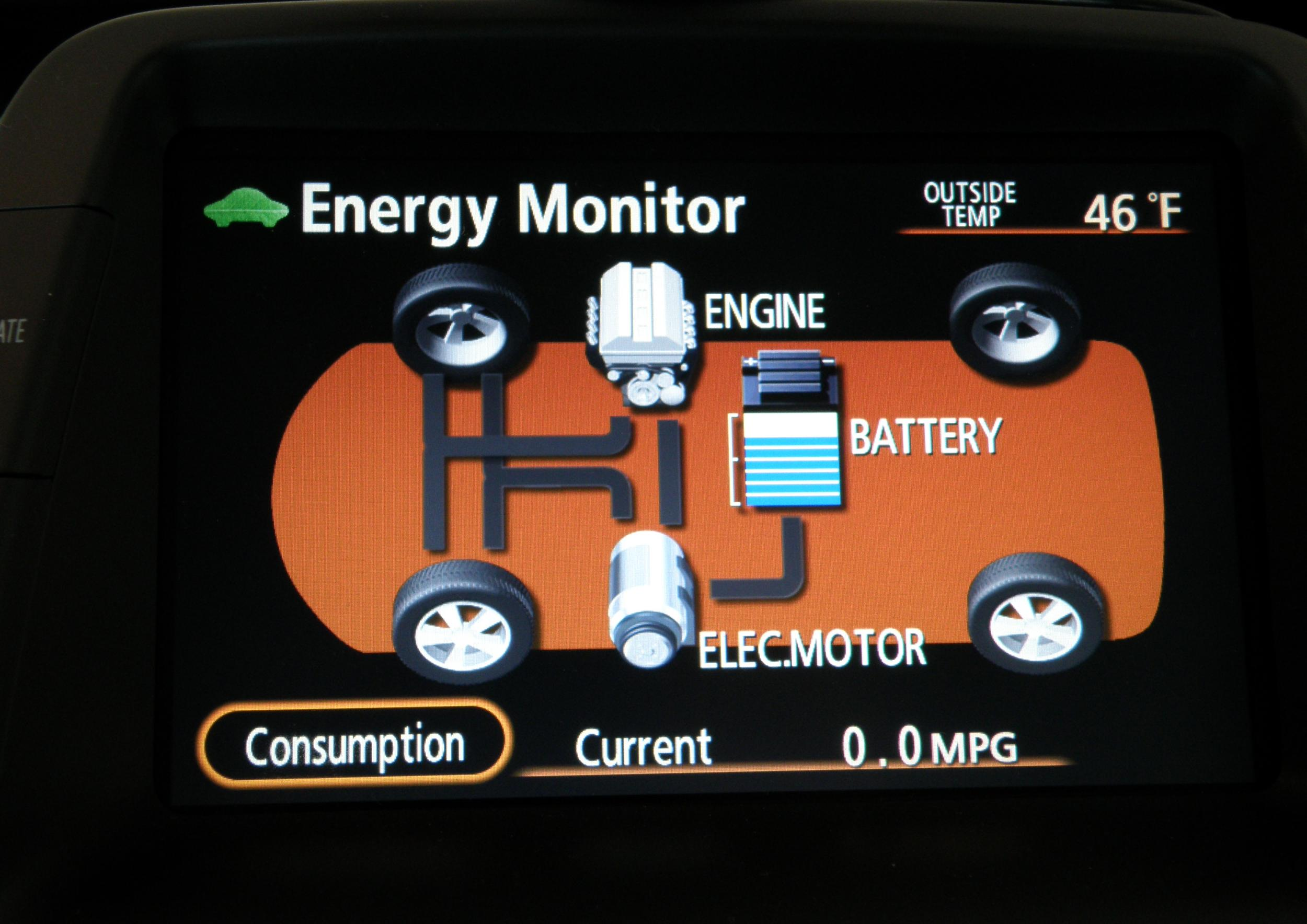 Automobile Hybride